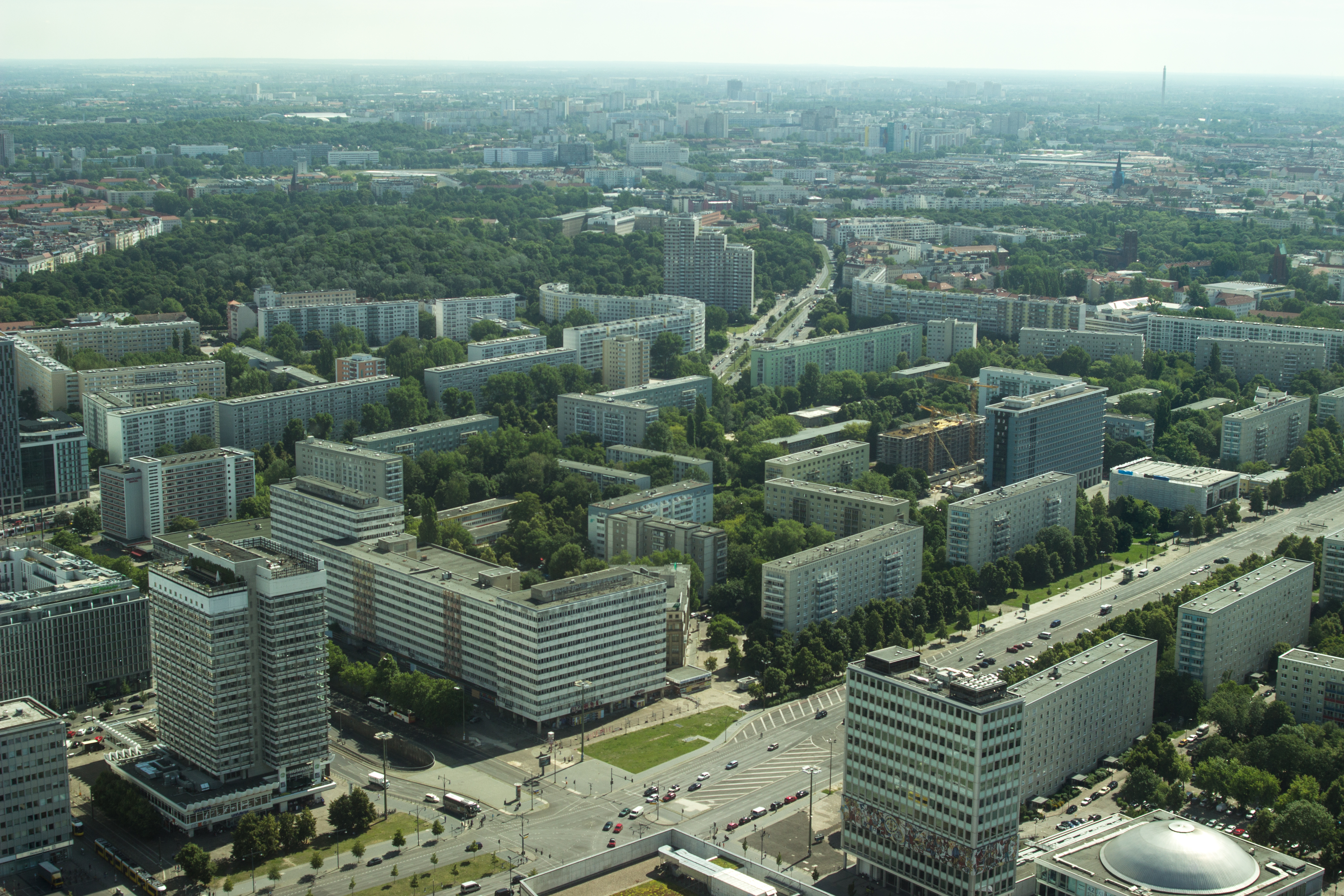 Der Ausblick aus dem Berliner Fernsehturm. Geschossen mit der EOS 600D und dem 50mm 1.8 Objektiv.